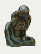 Photo : Pixis. Don à Wikipedia de l'ayant-droit d'IchÃ©. Autorisation-OTRS-GFDL|otrs=2006072710012609|auteur=Rose-Hélène Iché